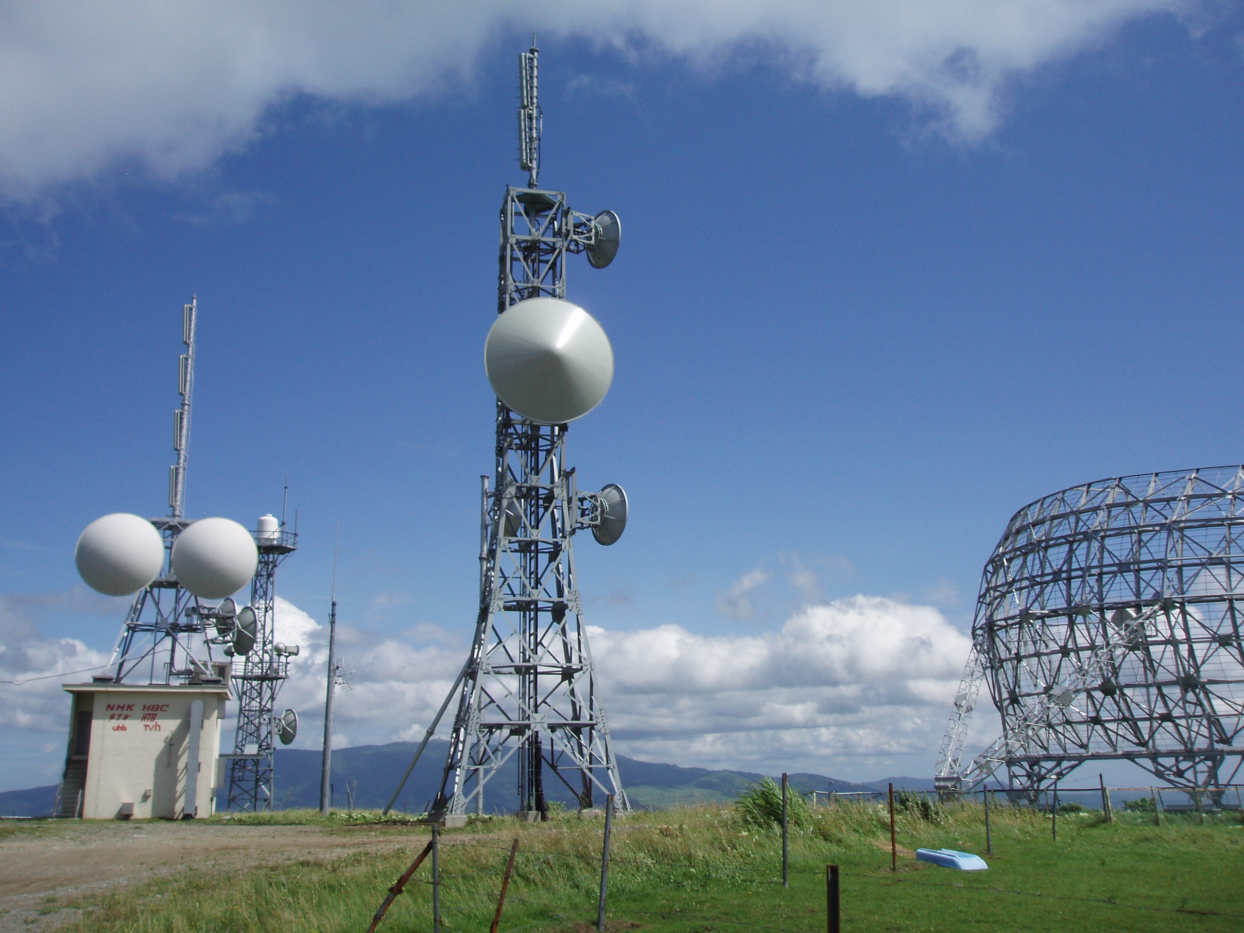 大沼中継局